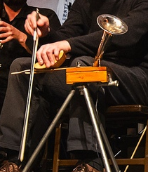 Даксофон Дмитрия Тыквина